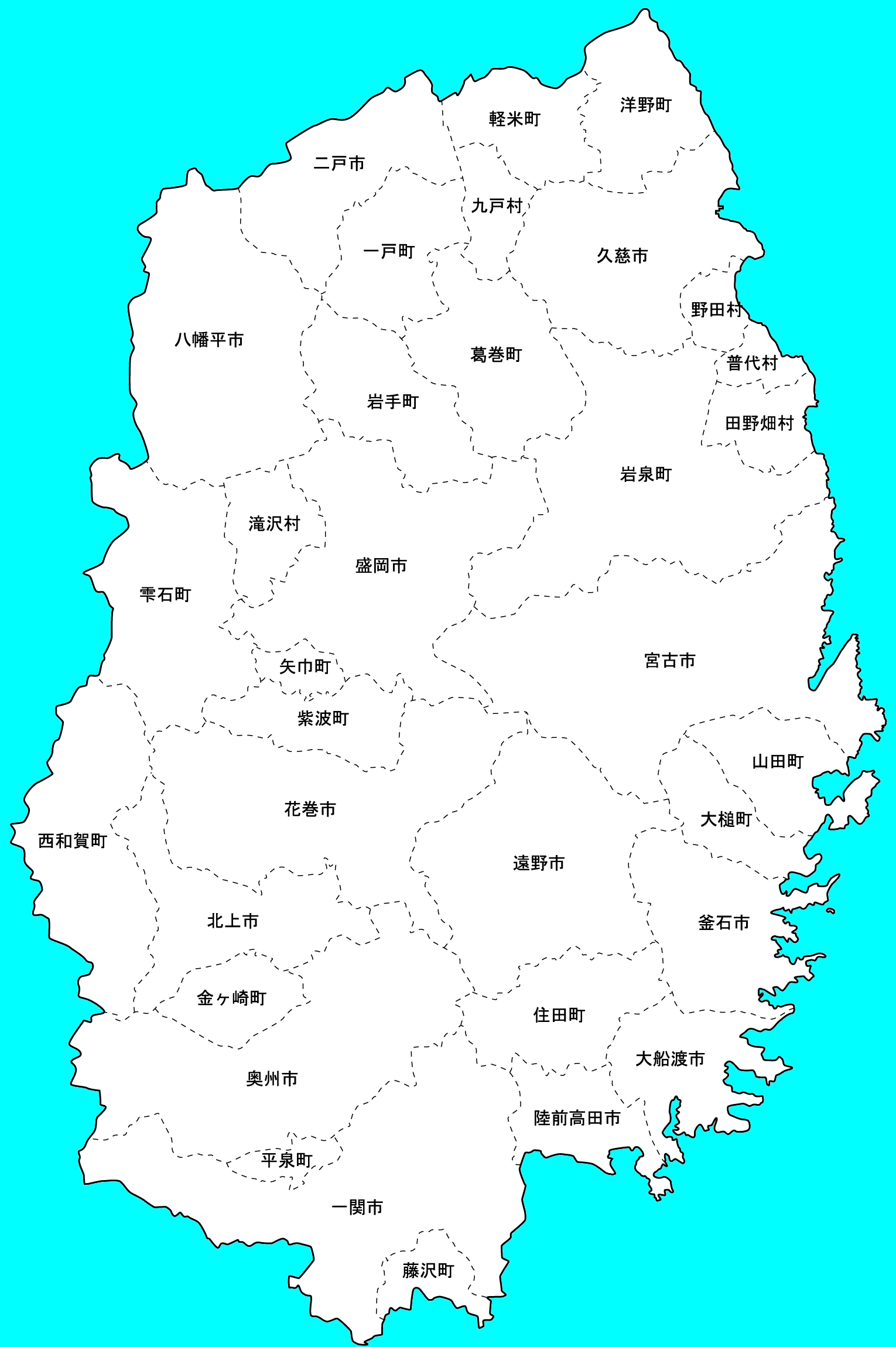 岩手県の地方行政区分の地図です。